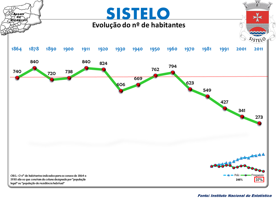 Censos 1864/2011